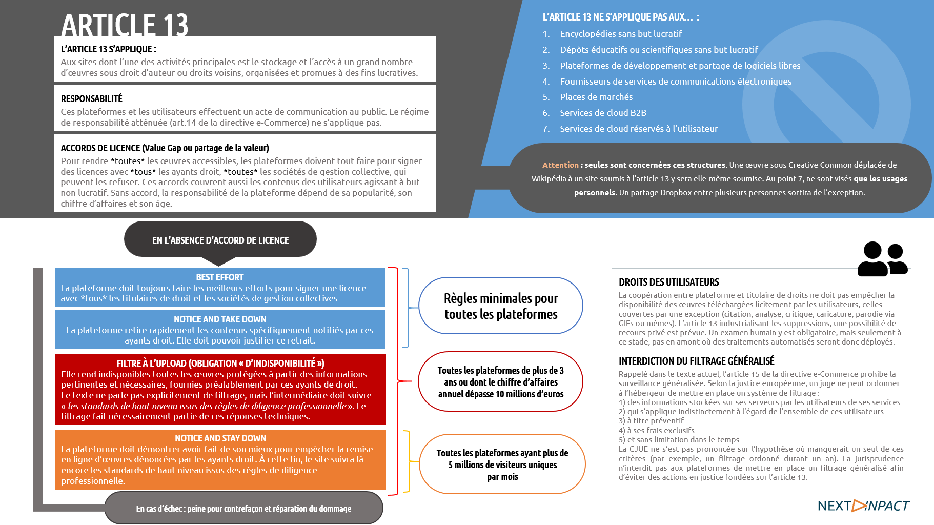 schéma pour comprendre l’article 13 de la directive droit d'auteur